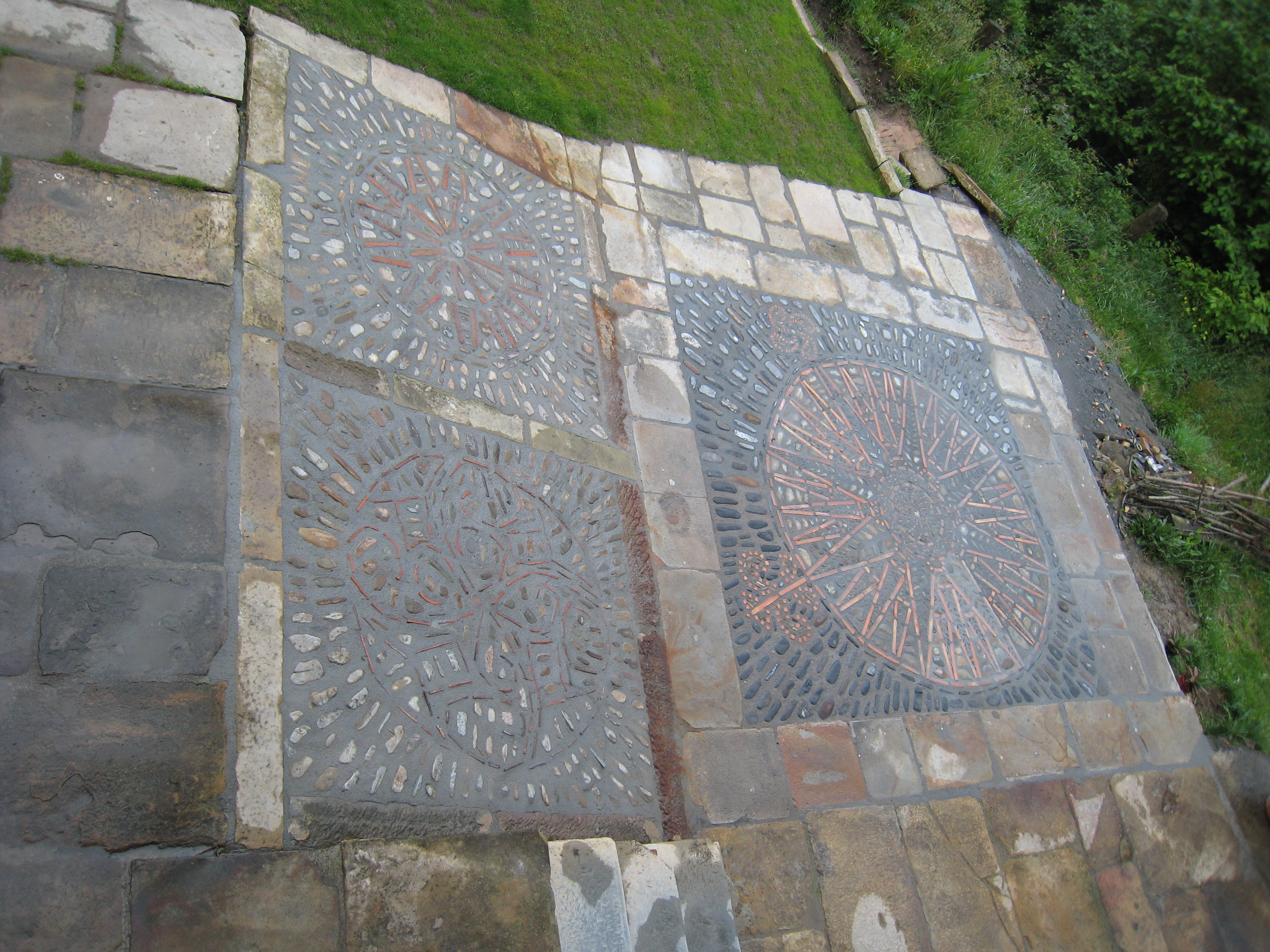 Bizkaiko Garai herrian kokatuta. 2008an egindakoa